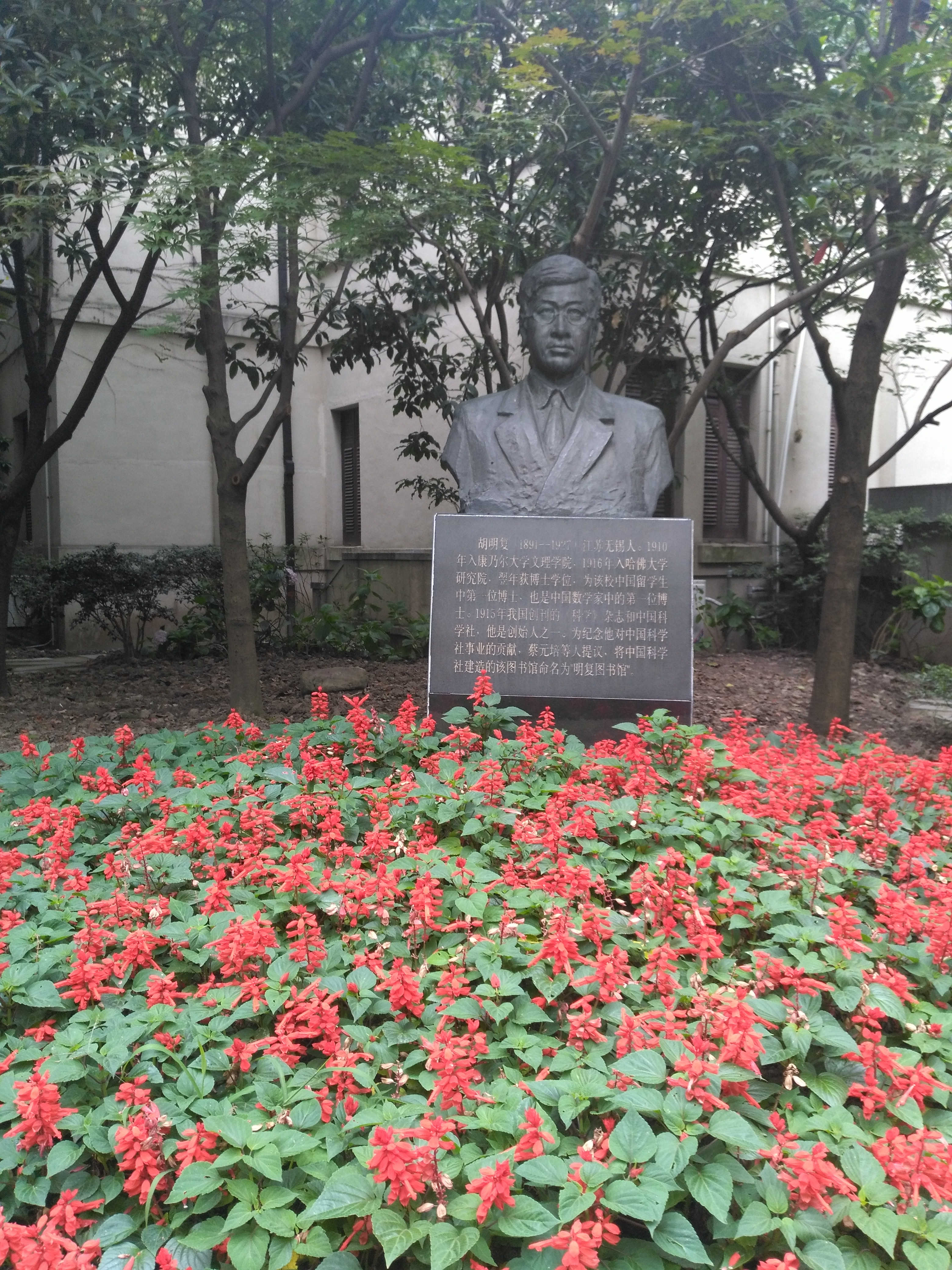 胡明复雕塑，黄浦区明复图书馆立。